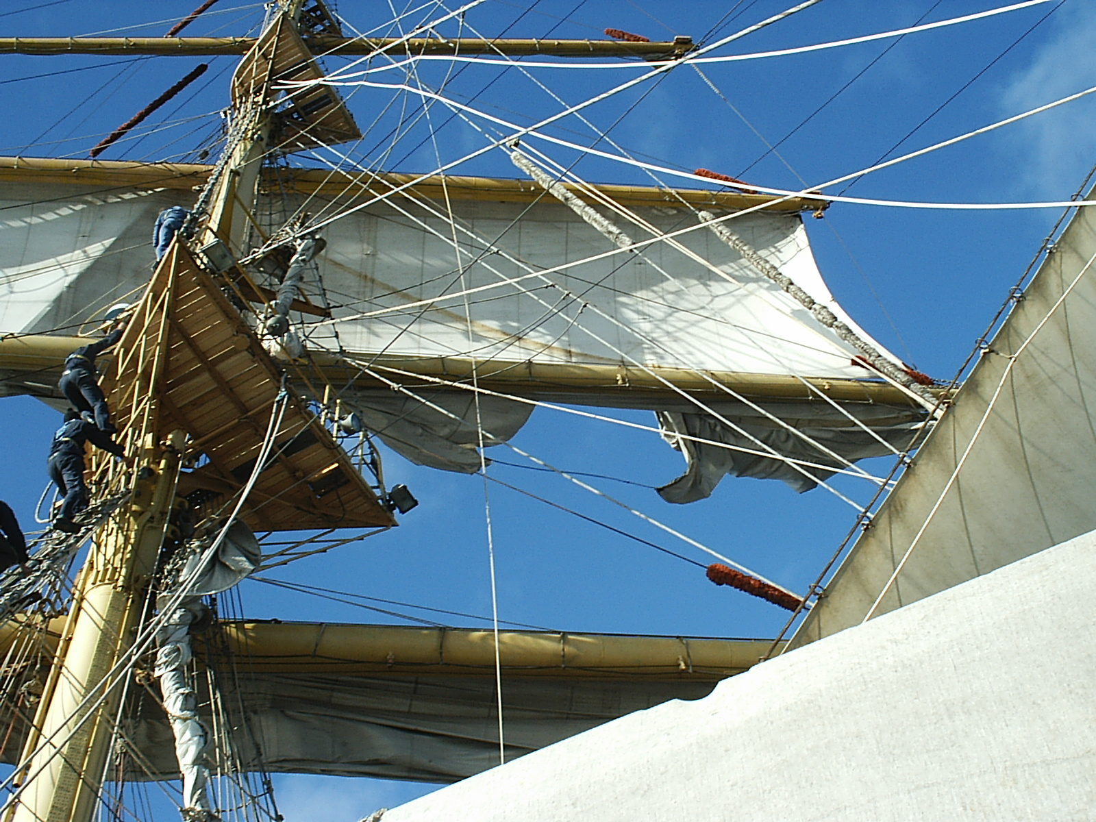 Nadieżda